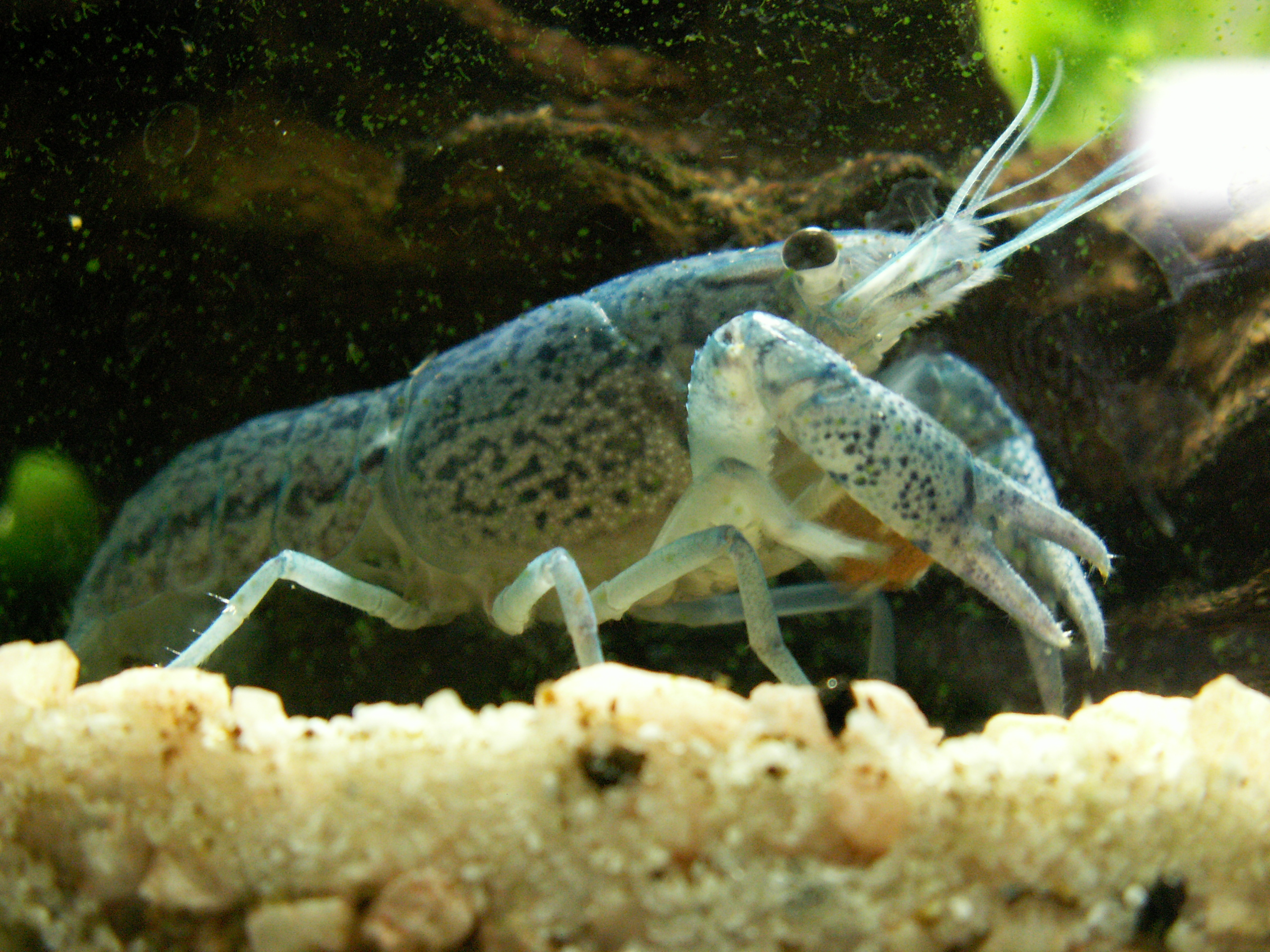 Blauer Florida Flußkrebs / Procambarus Alleni